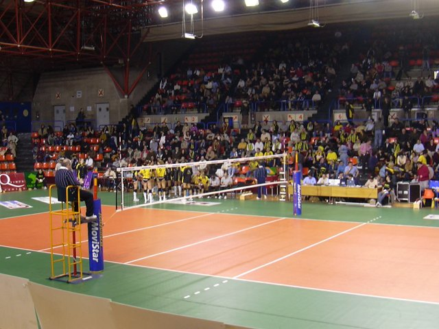 (English) Time-out at volleyball pavilion "El Plantío" in Burgos (Spain) (Español) Tiempo muerto en un partido de voleibol femenino en el pabellón muncipal de "El Plantío" en Burgos. El suelo del pabellón está cubierto con una superficie especial que es obligatoria para las competiciones internacionales de voleibol. El equipo burgalés cuenta con una de las aficiones de voleibol más activas.